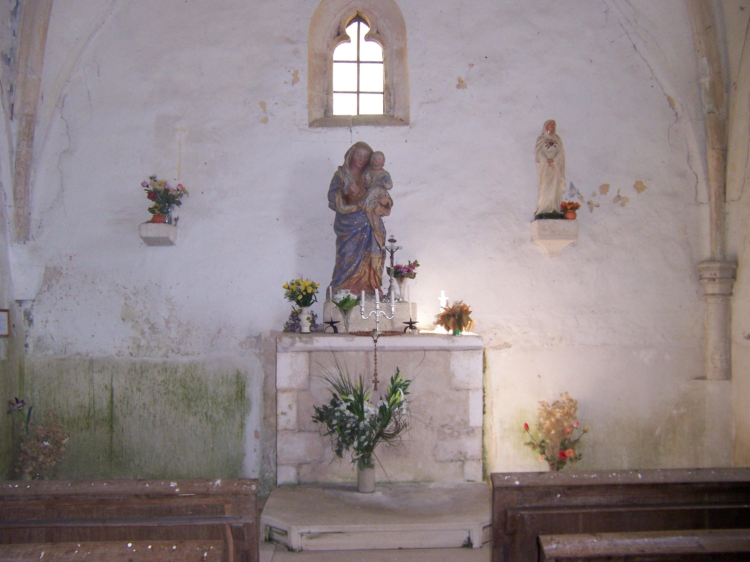 Vue de l'intérieur de la Chapelle Photographie personnelle de Florian Godard (= Utilisateur:Clerey).